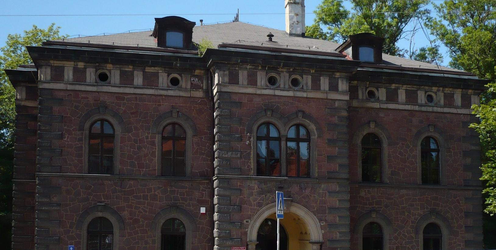 Nowa Ruda, ul. Niepodległości 2 - pierwotnie budynek starostwa powiatowego, następnie siedziba szkoły milicyjnej, sądu, prokuratury, kolegium ds. wykroczeń, komornika, Gminnego Ośrodka Pomocy Społecznej, Rady Gminy Nowa Ruda, obecnie VII Zamiejscowy Wydział Ksiąg Wieczystych i świetlica kuratorska, 1877